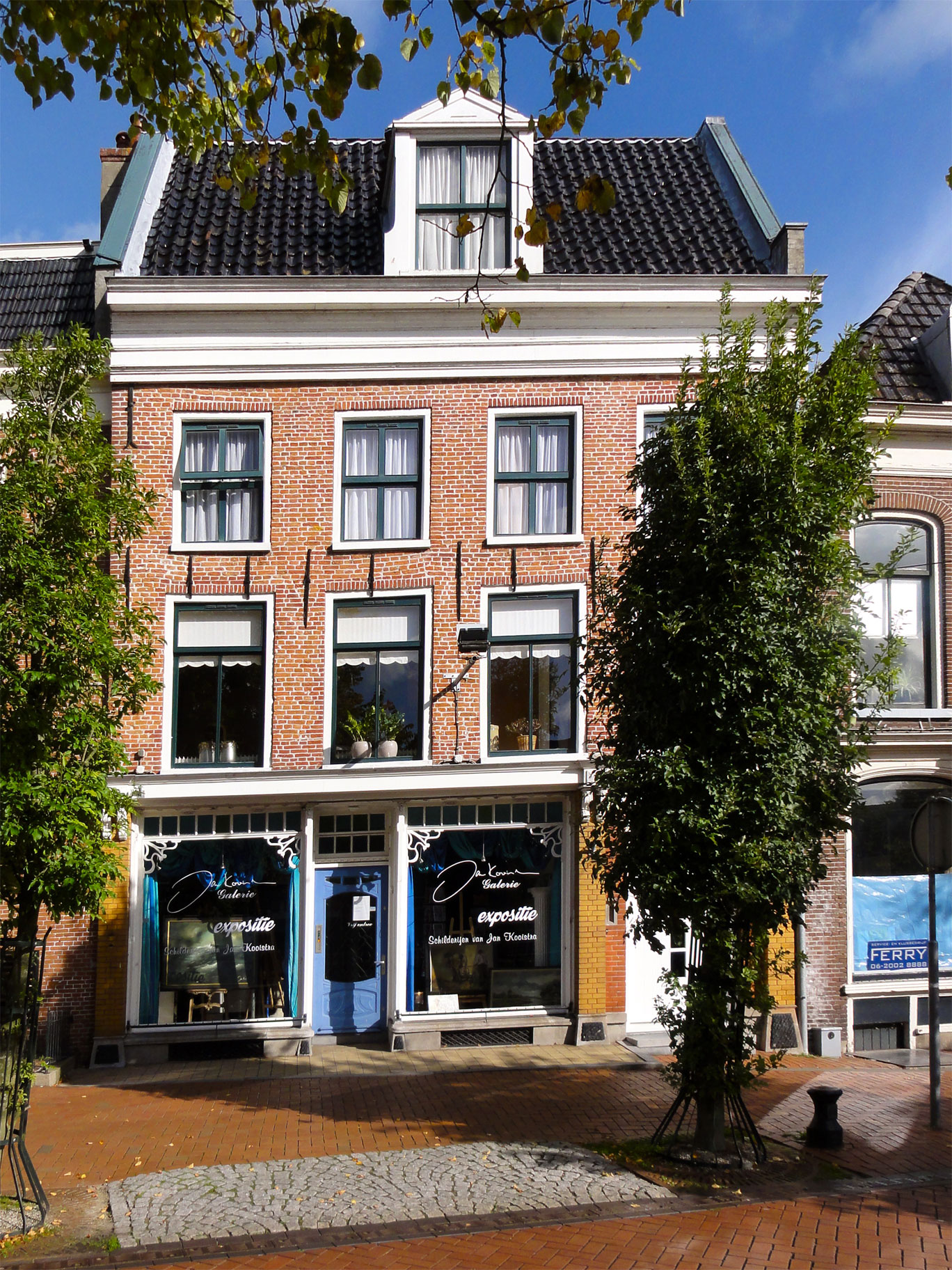 Diepswal 3 Dokkum. rijksmonument